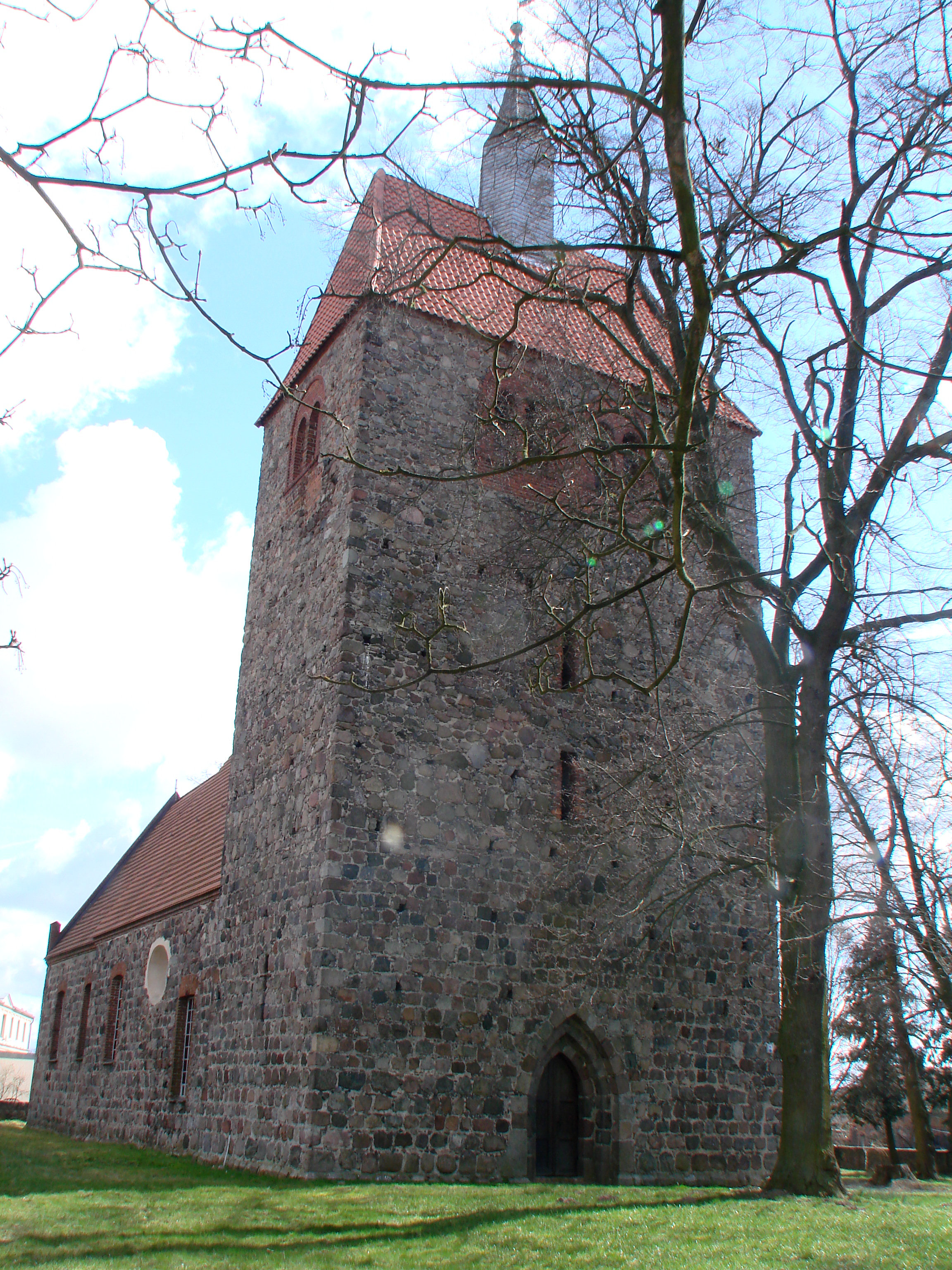 Arensdorf alte Wehrkirche